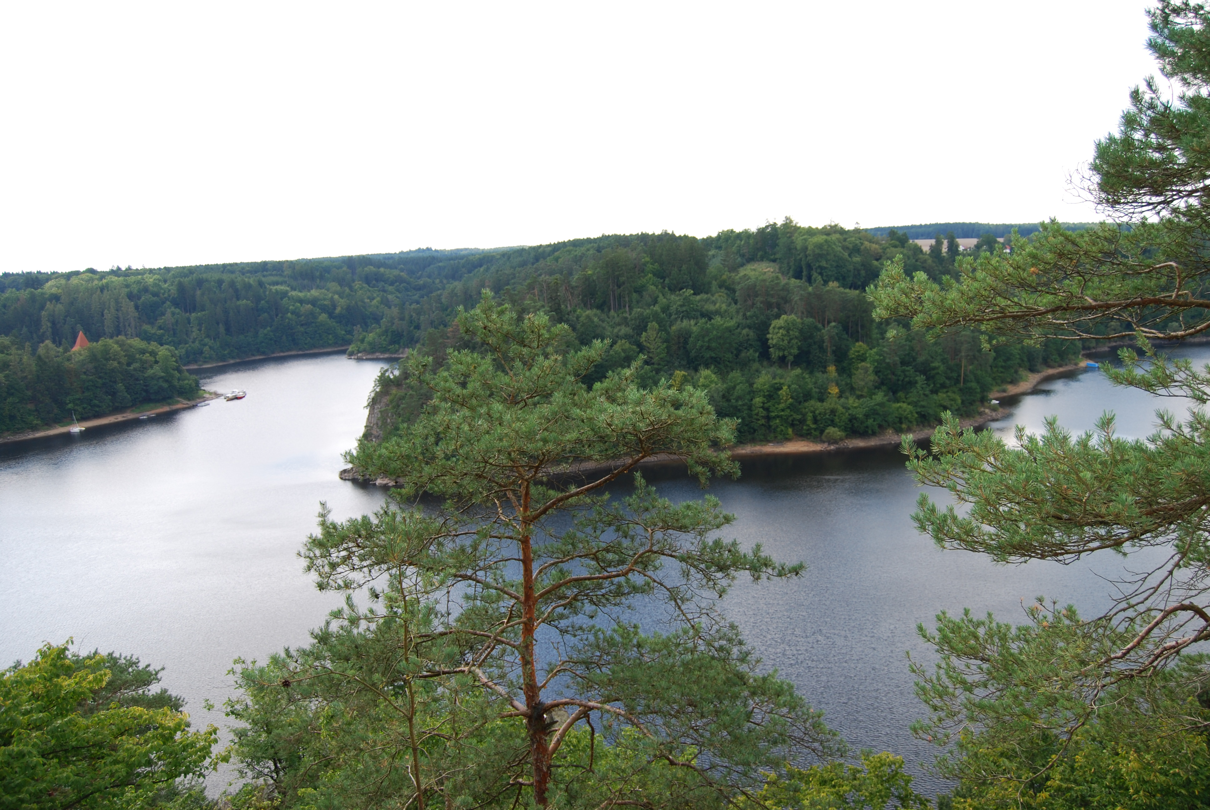 Pohled na řeku ze staré Kazimourovy silnice. Varta je místní část obce Jickovice. Okres Písek. Česká republika.